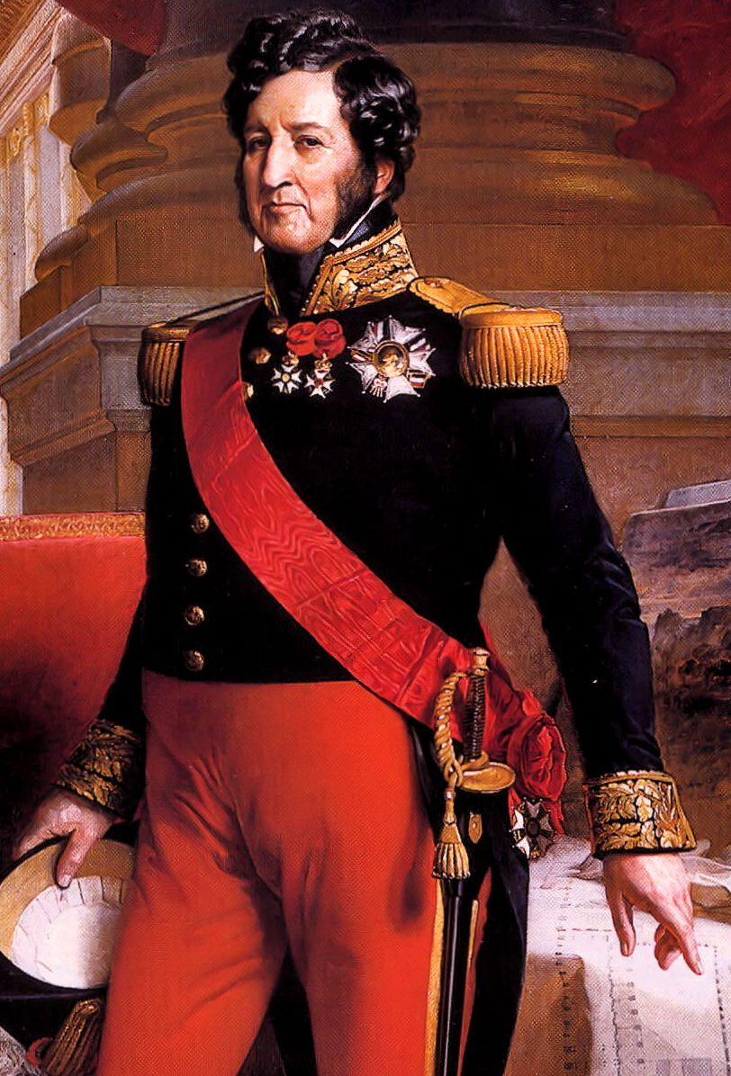 Detail ("kniestuk") van Lodewijk Filips (File:Franz Xaver Winterhalter King Louis Philippe.jpg). De bronafbeelding was niet geschikt als illustratie van een artikel over het ordekruis van de koning.